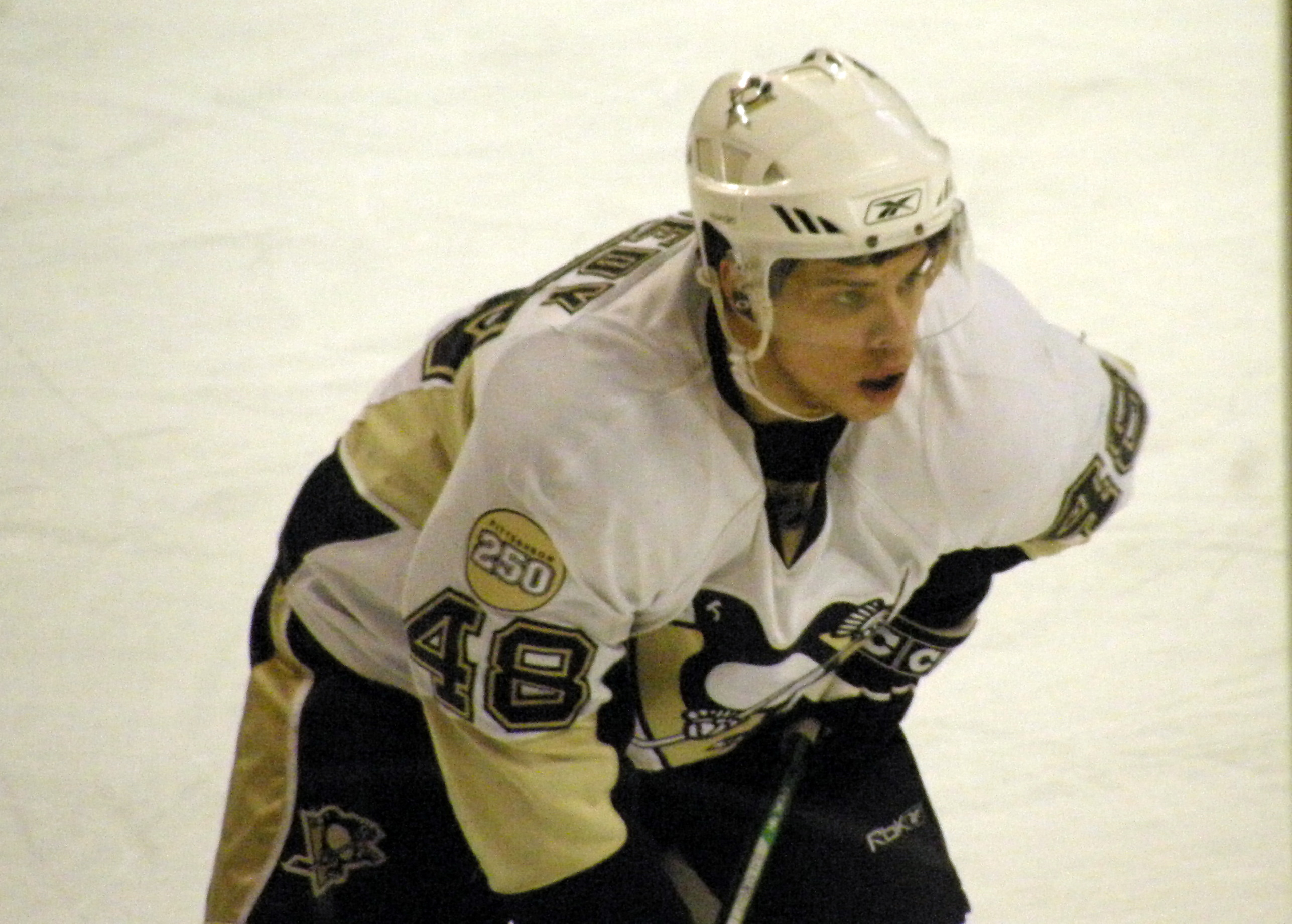 #48 Tyler Kennedy (C)